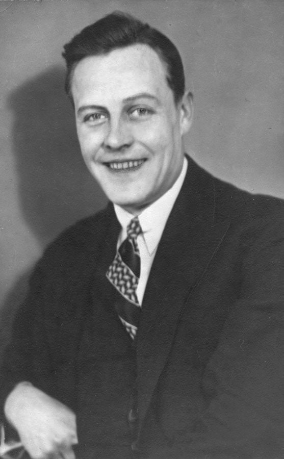 Martti Jukola